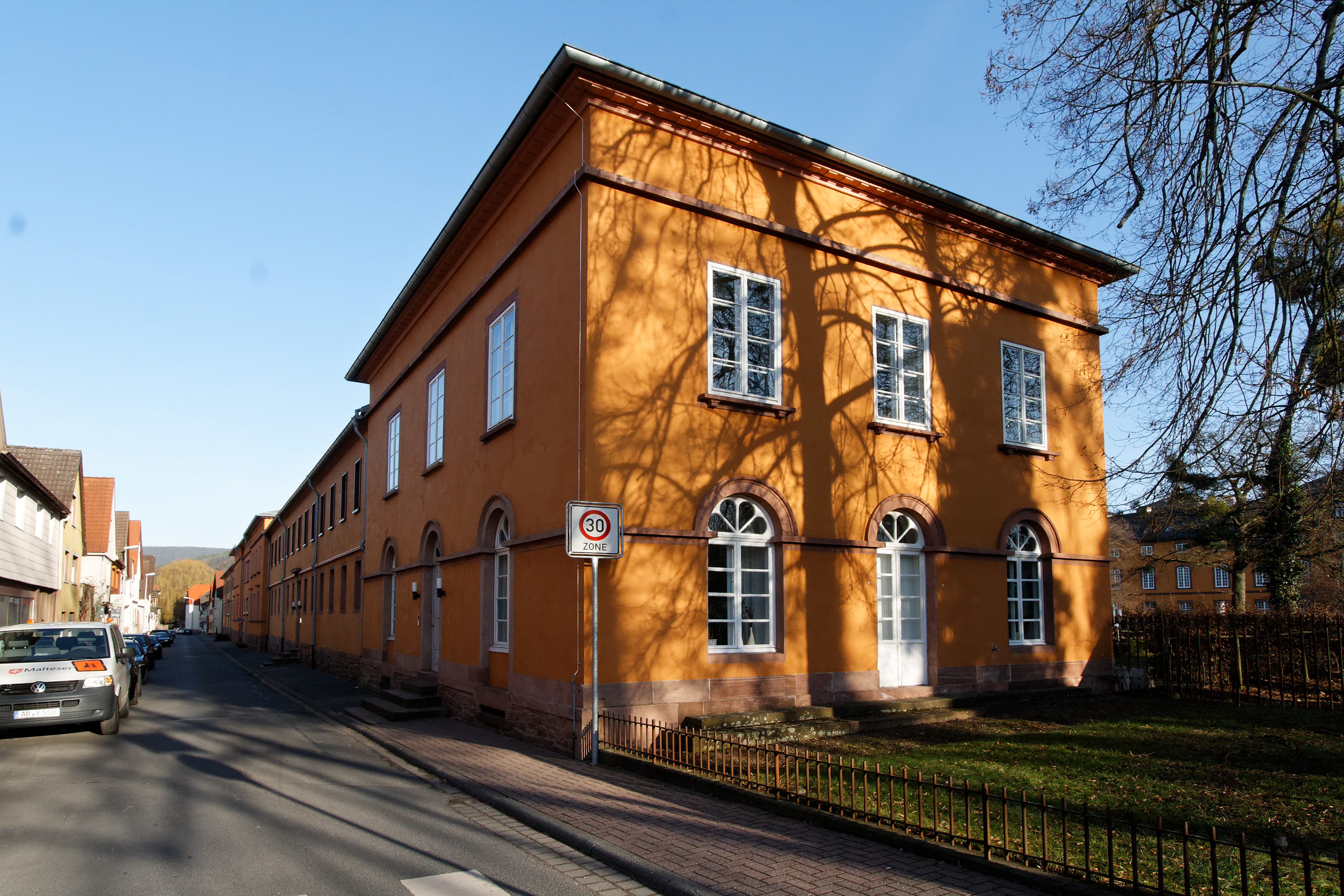 Ehemaliges Dienstbotengebäude von Schloss Löwenstein in Kleinheubach (Bayern)